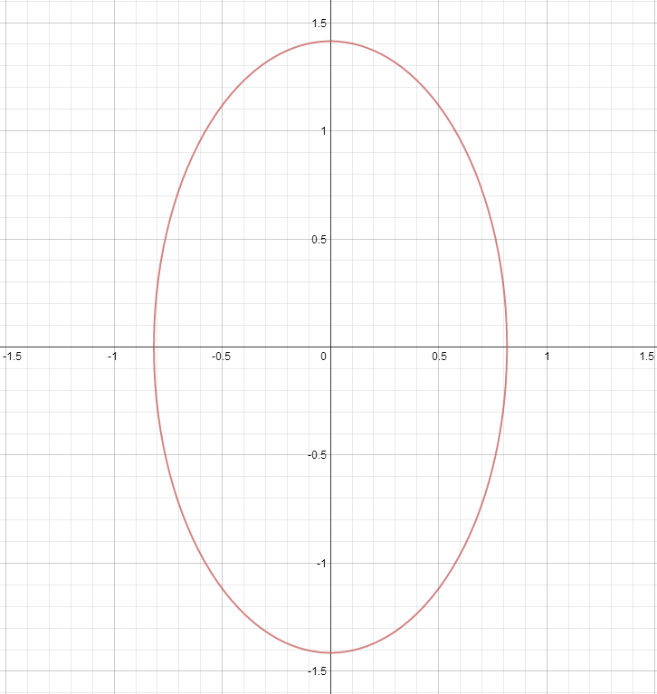 Graph created at